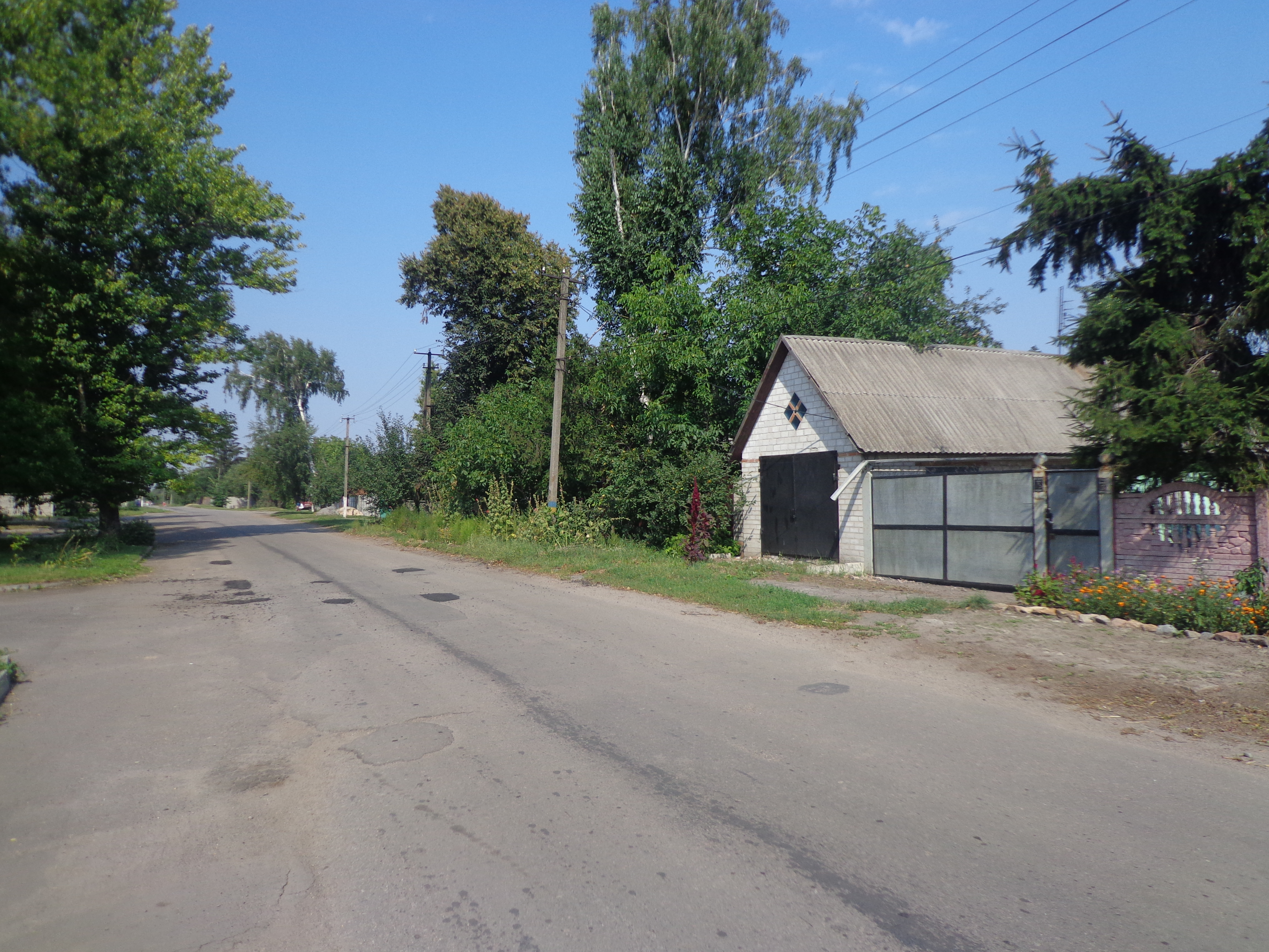 Улица у вокзала. Село Огульцы, Валковский район, Харьковская область, Украина.